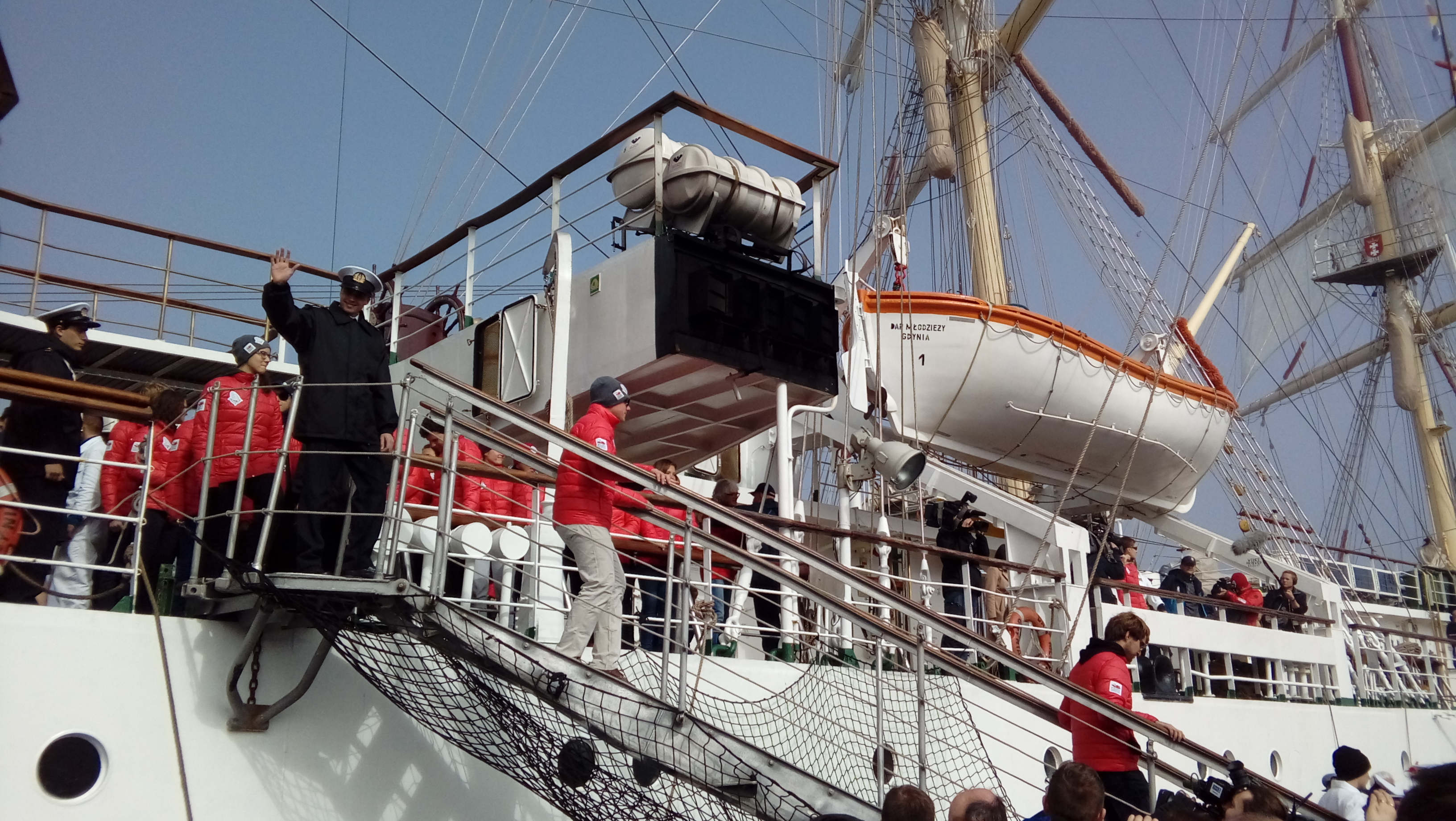 Dar Młodzieży w Gdyni po powrocie z Rejsu Niepodległości, schodzą na ląd uczestnicy rejsu